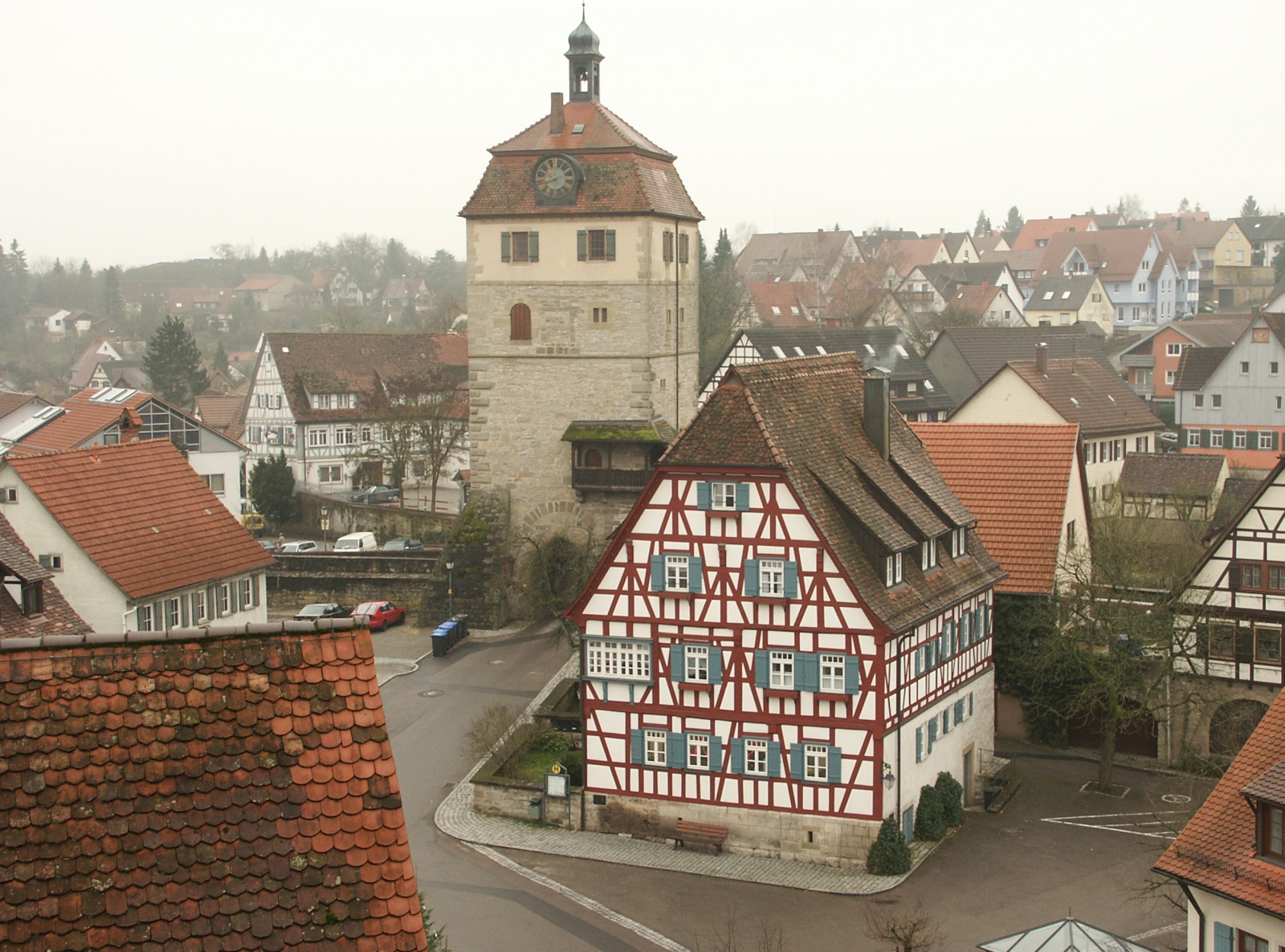 Blick vom Dach des oberen Schlosses zum Torturm